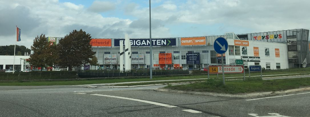 Næstved Megacenter